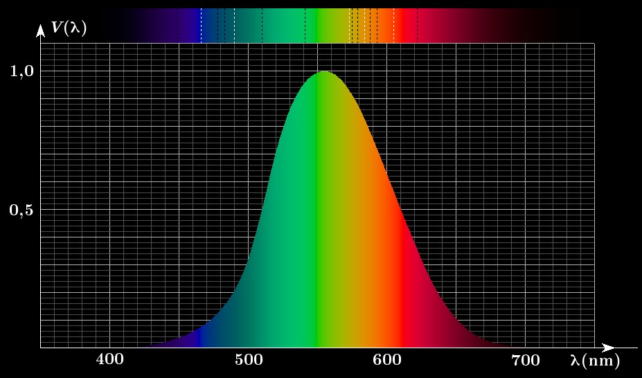 Efficacité lumineuse spectrale relative photopique CIE 1924. Les couleurs ont été choisies pour avoir la même longueur d'onde dominante dans le système colorimétrique CIE 1931. La luminance est pondérée pour chaque raie pour être proportionnelle à la luminance Y = 0.2126 R + 0.7152 G + 0.0722 B selon la définition du système CIE XYZ 1931.